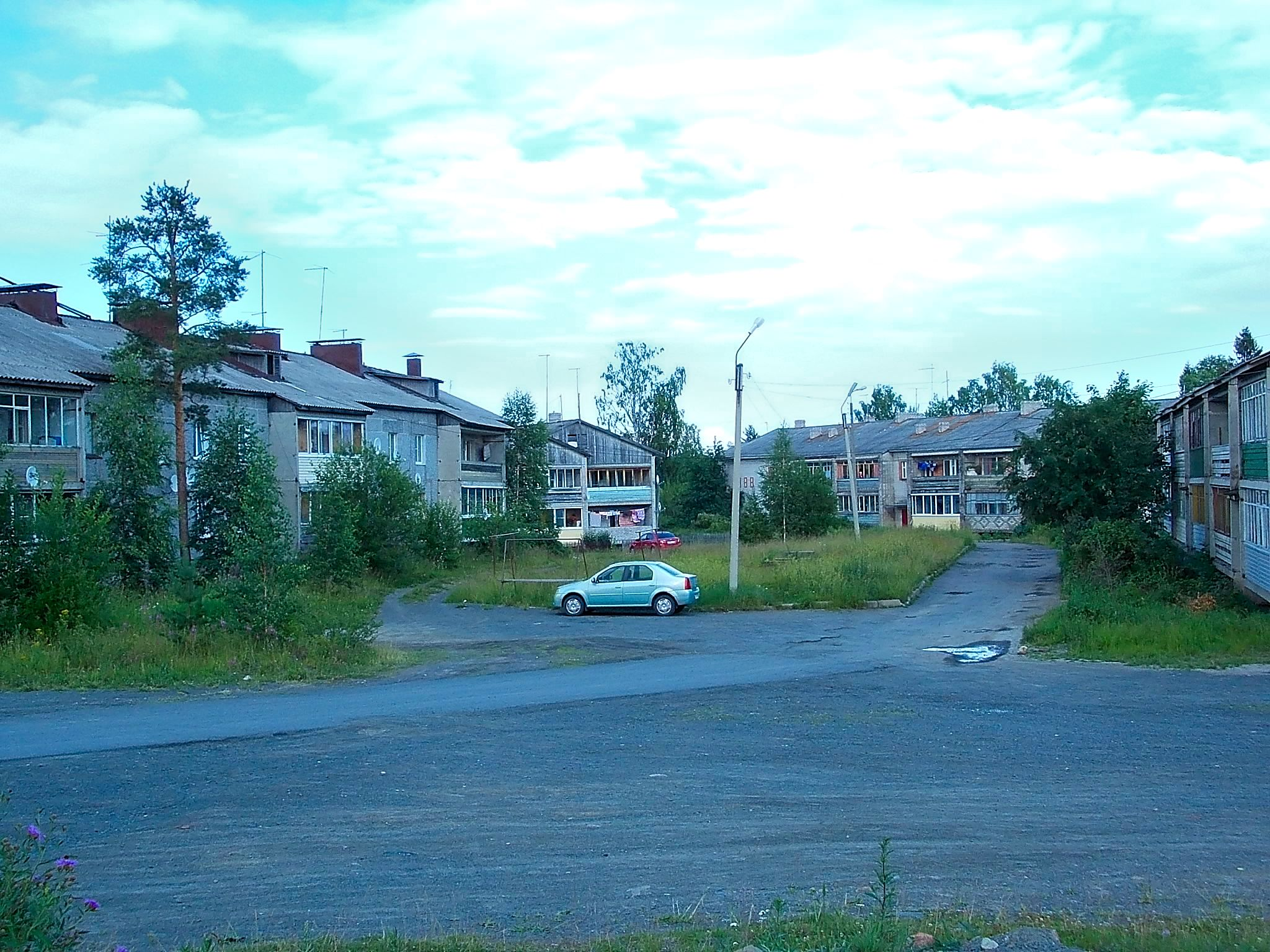 Дома в Деревянке недалеко от станции